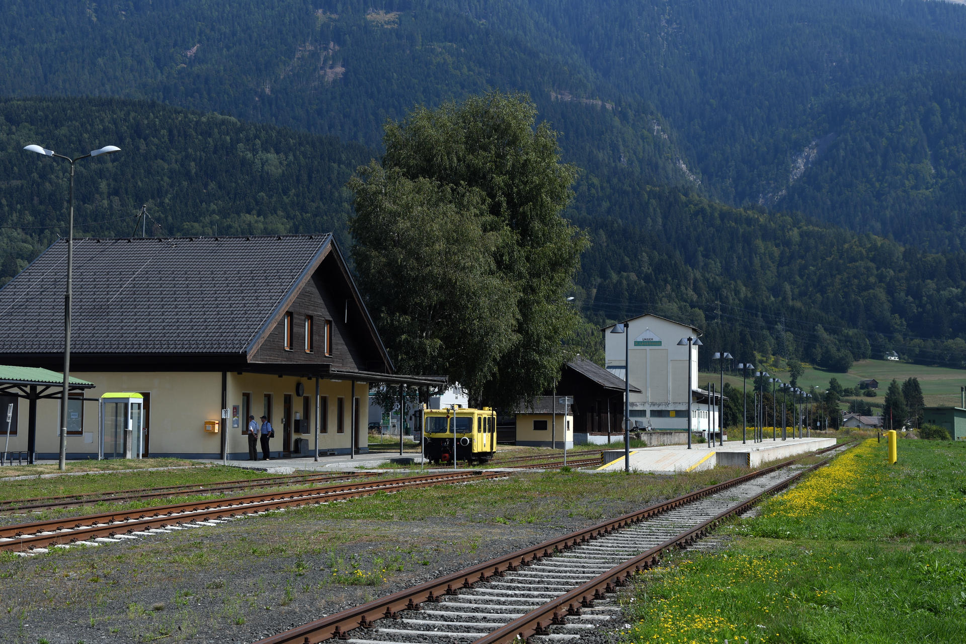 Bahnhof Kötschach-Mauthen mit "Postkastel"